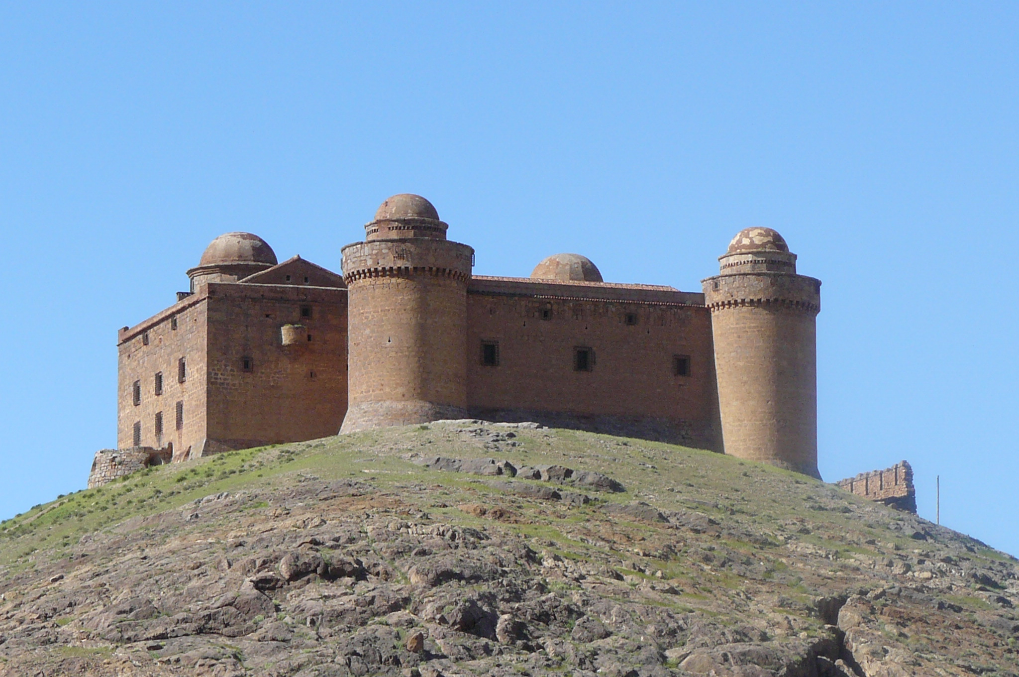 Castillo de la Calahorra, Granada, España